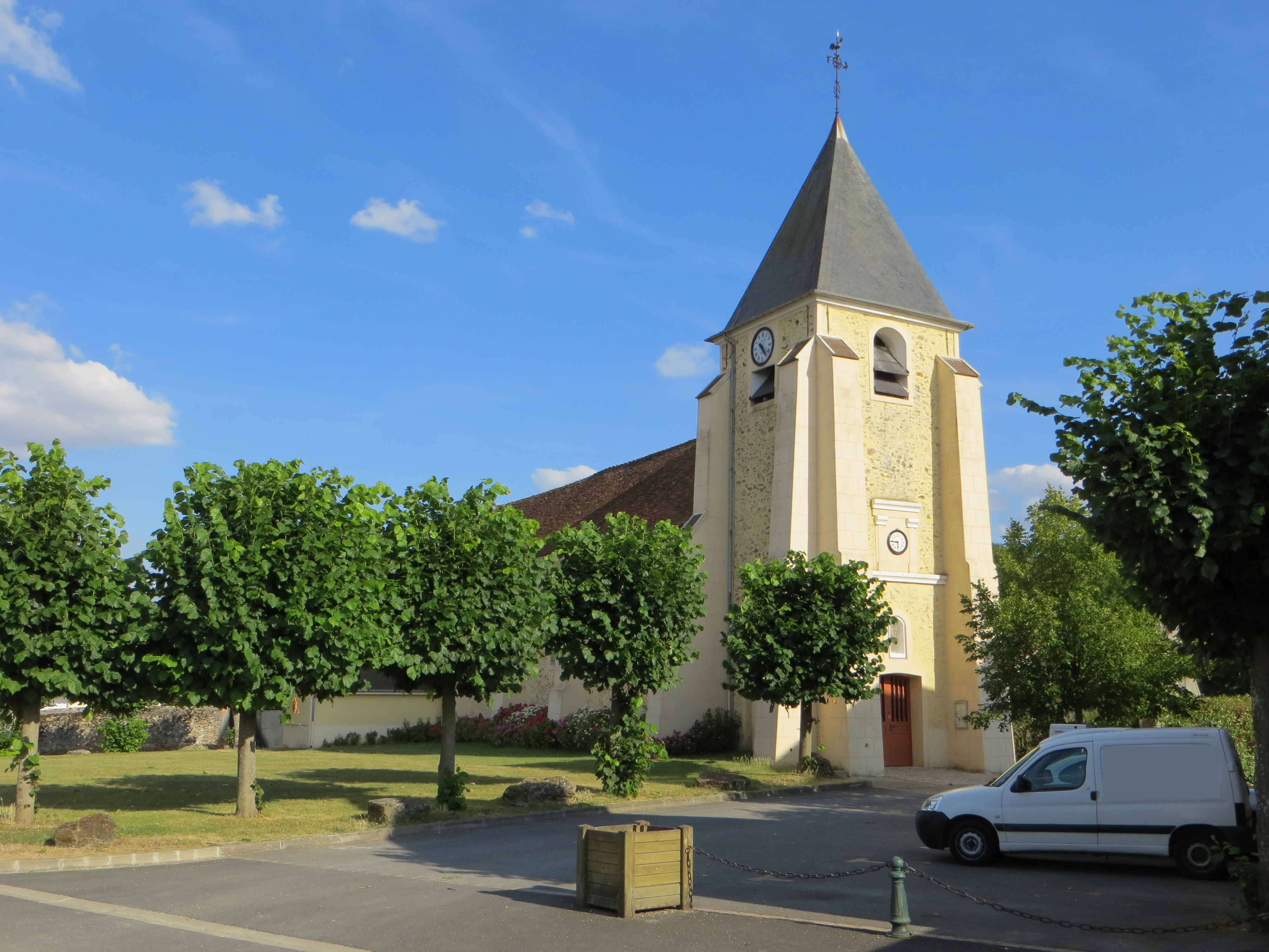 Église de Sancy